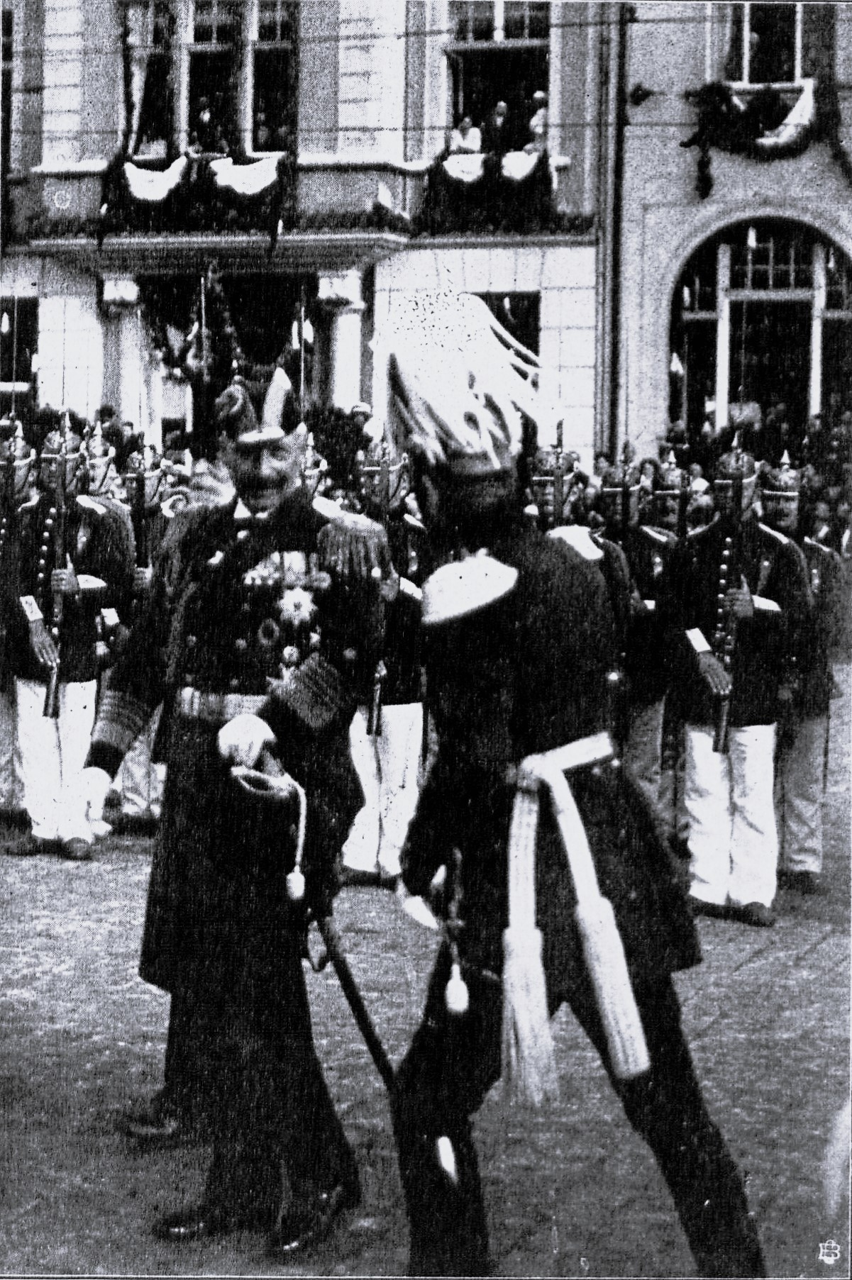 Der Kaiser nimmt die Meldung des GEneralmajors entgegen.